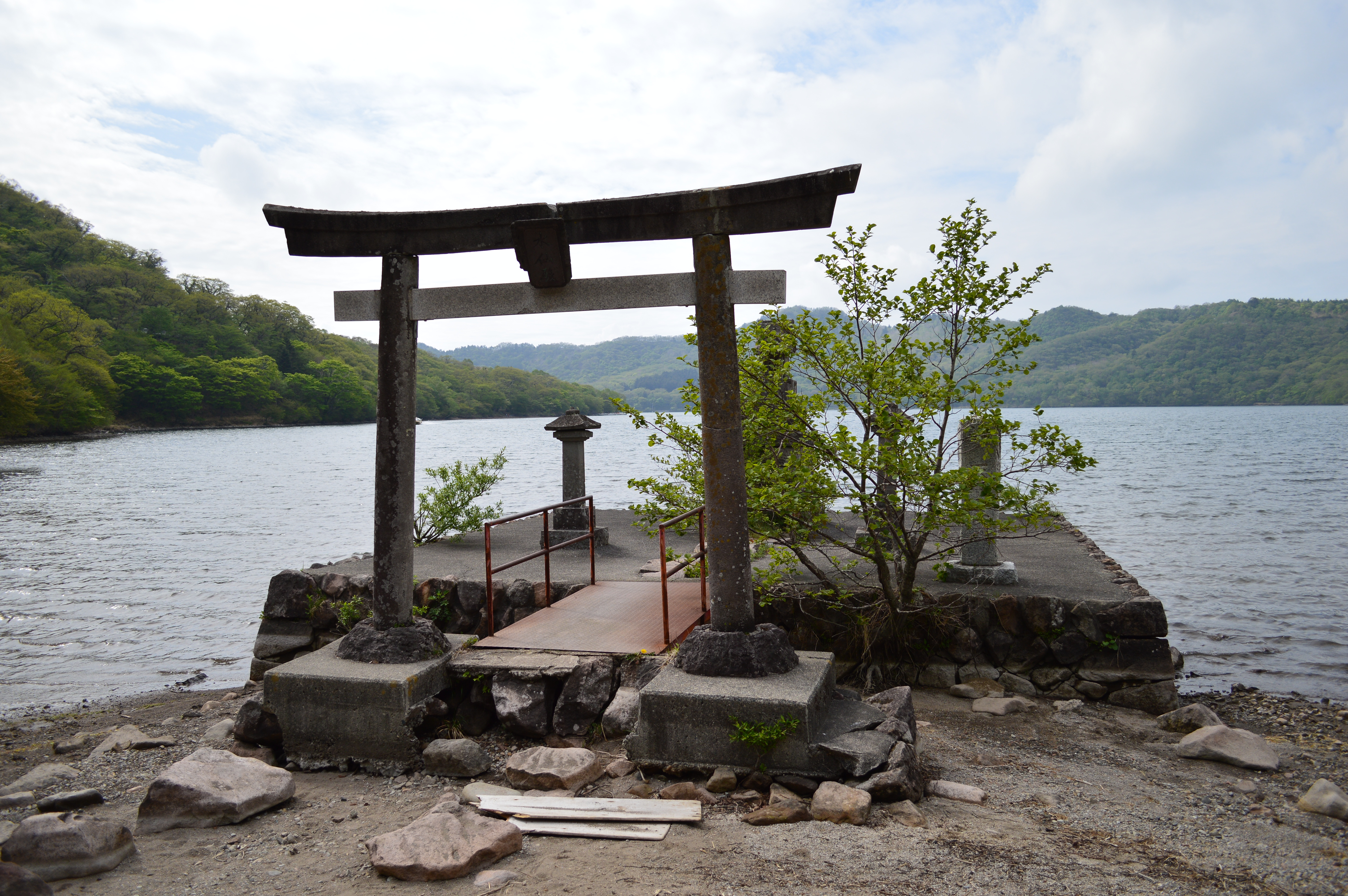 大洞赤城神社 元宮弁天宮